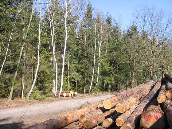 Parforceheide Brandenburg/Berlin, Holzstapel